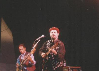 João Bosco num show em Milão no Festival latinoamericano, 1996